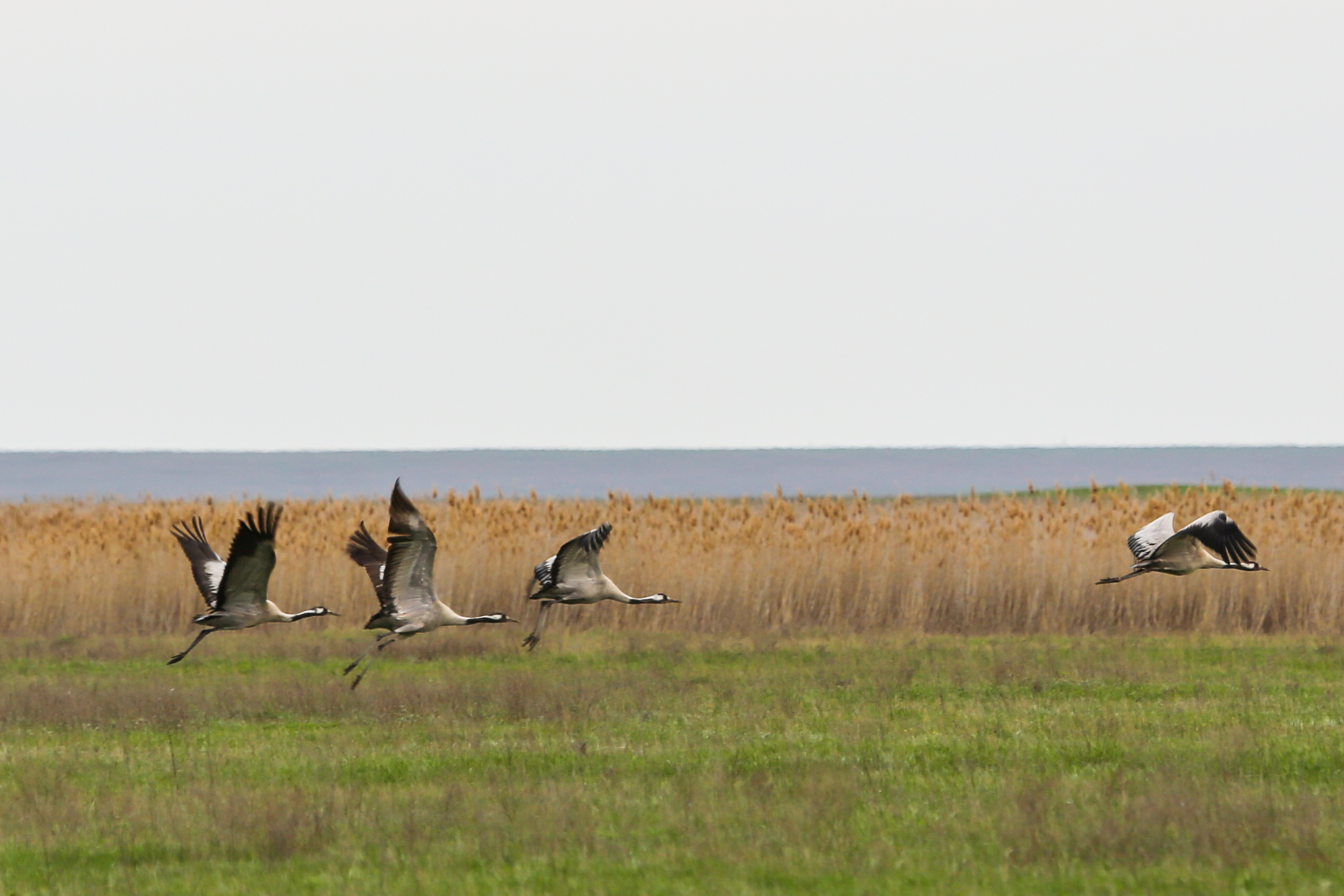 Серый журавль на пролете на территории буферной зоны заповедника "Ростовский"